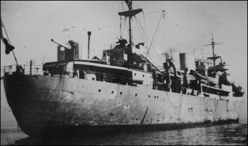 Le croiseur auxiliaire Quercy, dont l'armement modifié en "Transport Armé" ne comporte plus qu'une seule pièce de 133 sur le roof arrière.